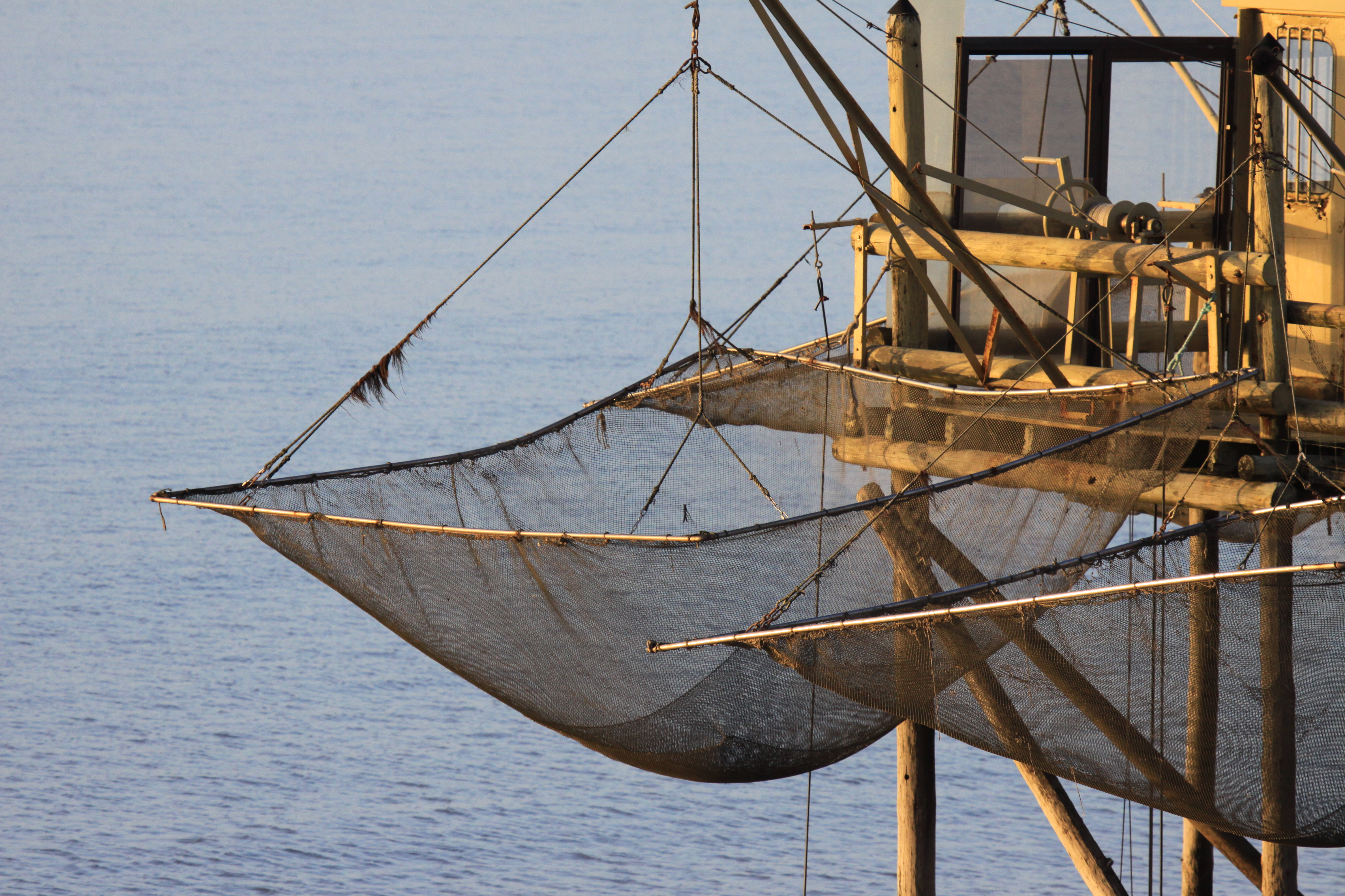 Un carrelet (engin de pêche) est constitué d' un filet en forme de poche attaché à un cadre métallique le plus souvent carré. Esnandes, Charente Maritime, France.